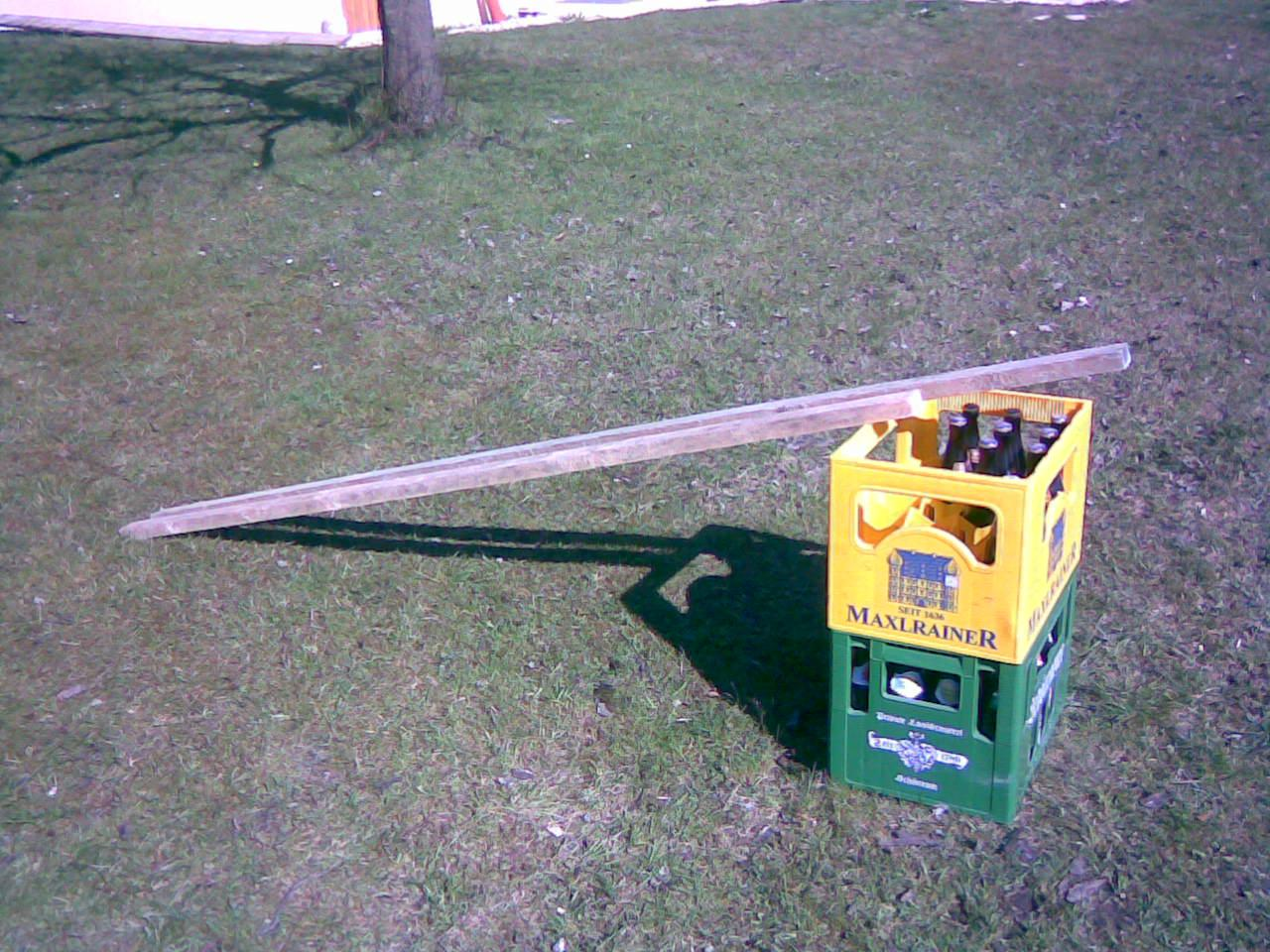 Bo beim Oascheim mid Dåchlattn vo zwoa Biatragl åba